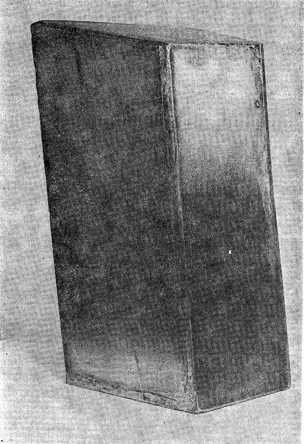 Barbara Kozłowska, model do projektu "Trwanie", 1970. Miejsce prezentacji: Sympozjum Plastyczne Wrocław '70, Wrocław, 1970. Fotografia: najprawdopodobniej Jan Bortkiewicz lub Michał Diament lub Zdzisław Holuka lub Czesław Żuk. Źródło: "Sympozjum Plastyczne Wrocław '70", red. Danuta Dziedzic, Zbigniew Makarewicz, Zjednoczone Przedsiębiorstwa Rozrywkowe Ośrodek Teatru Otwartego "Kalambur", Wrocław 1983, s. 100.